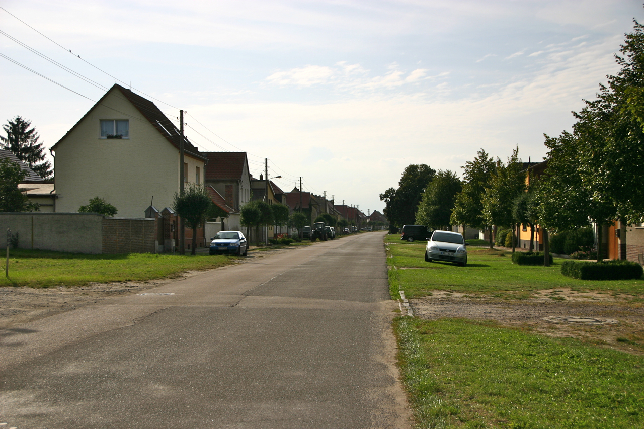 Chörau ist ein Ortsteil der Gemeinde Osternienburger Land im Landkreis Anhalt-Bitterfeld in Sachsen-Anhalt.